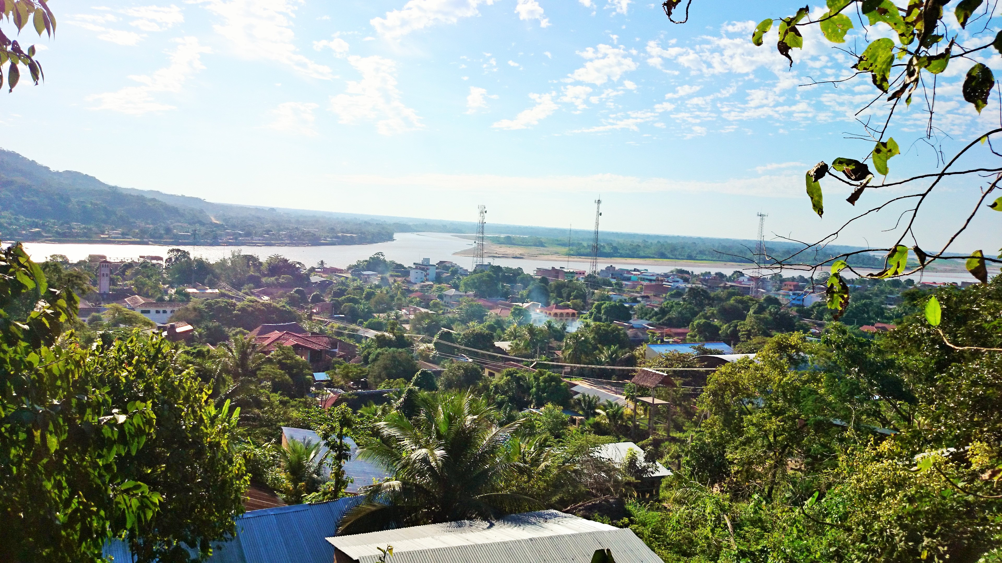 Rurrenabaque vista panoramica